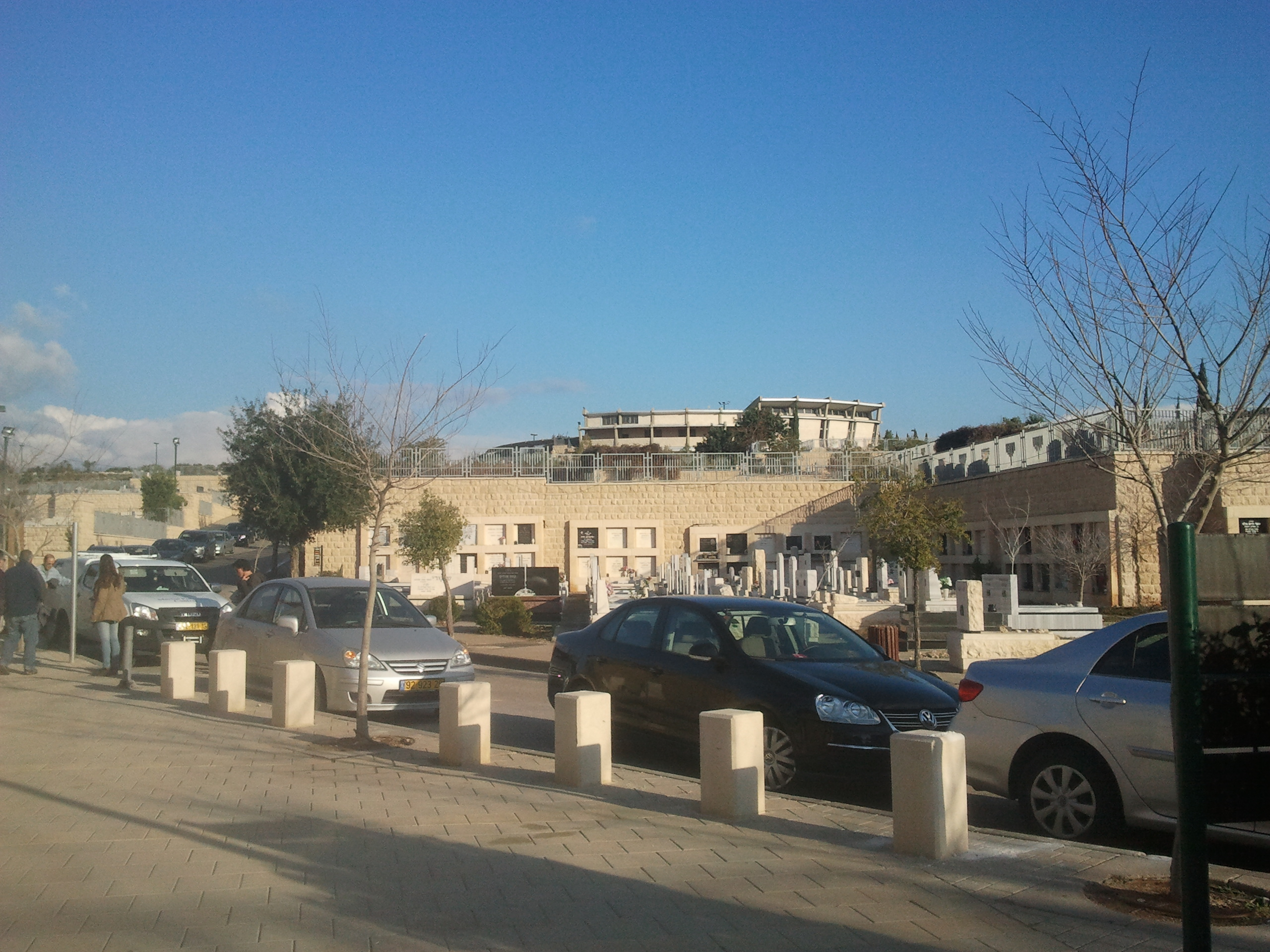 בית הקבות תל רגב שוכן ליד כביש 70 האמצע הדרך בין מחלף יגור למחלף סומך. הוא משרת את תושבי חיפה והקריות